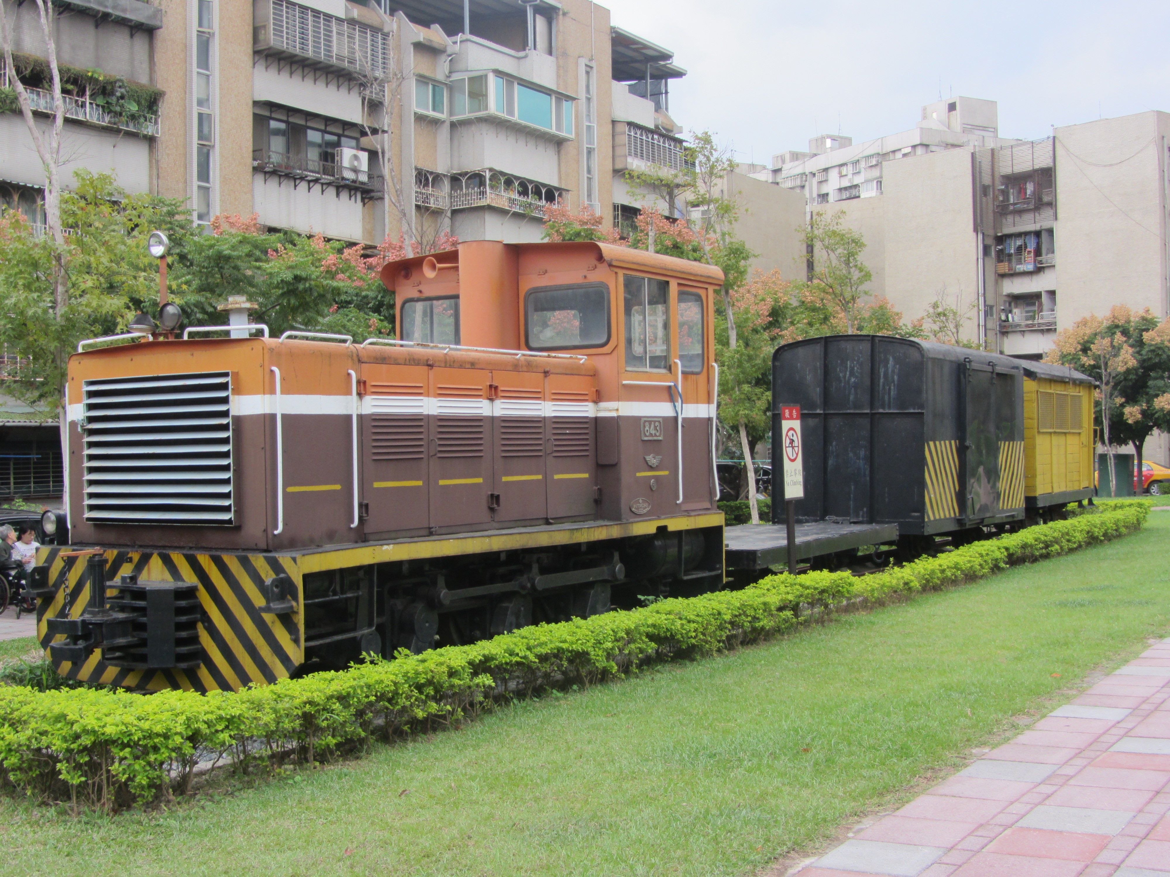 展示於糖廍文化園區的843號台糖日立牌內燃機車和其他貨車。